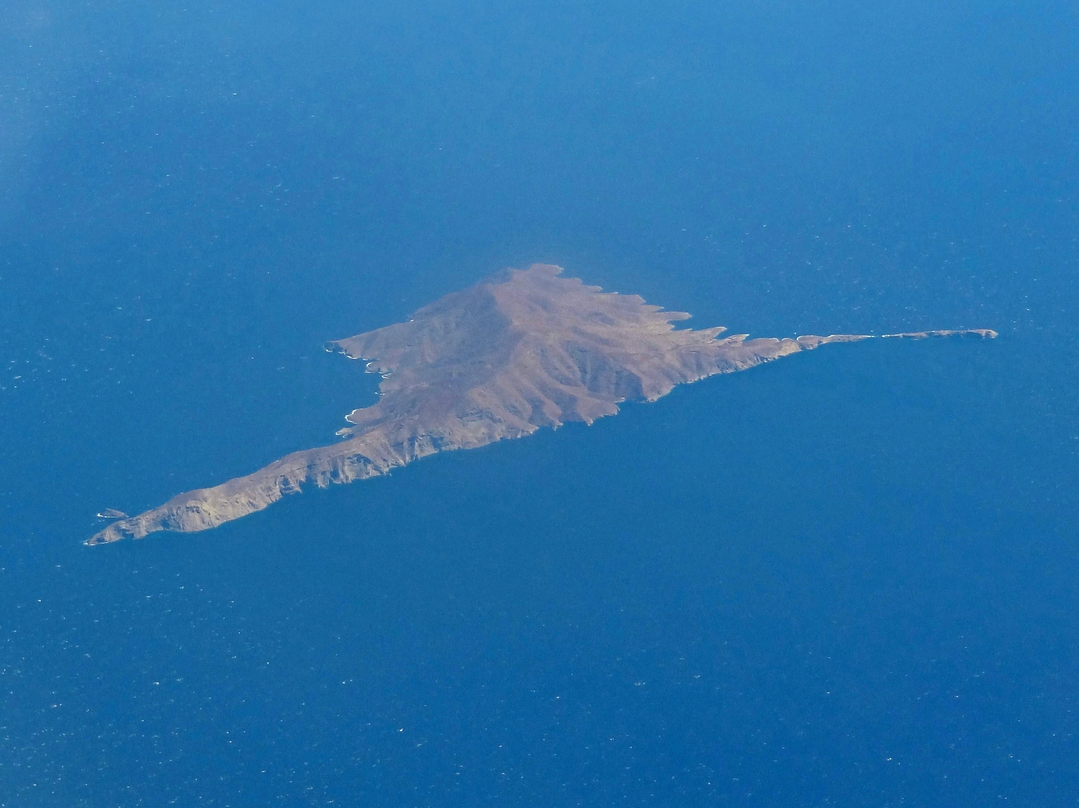 Insel Gyaros (Γυάρος), Gemeinde Syros-Ermoupoli, Kykladen, südliche Ägäis, Griechenland